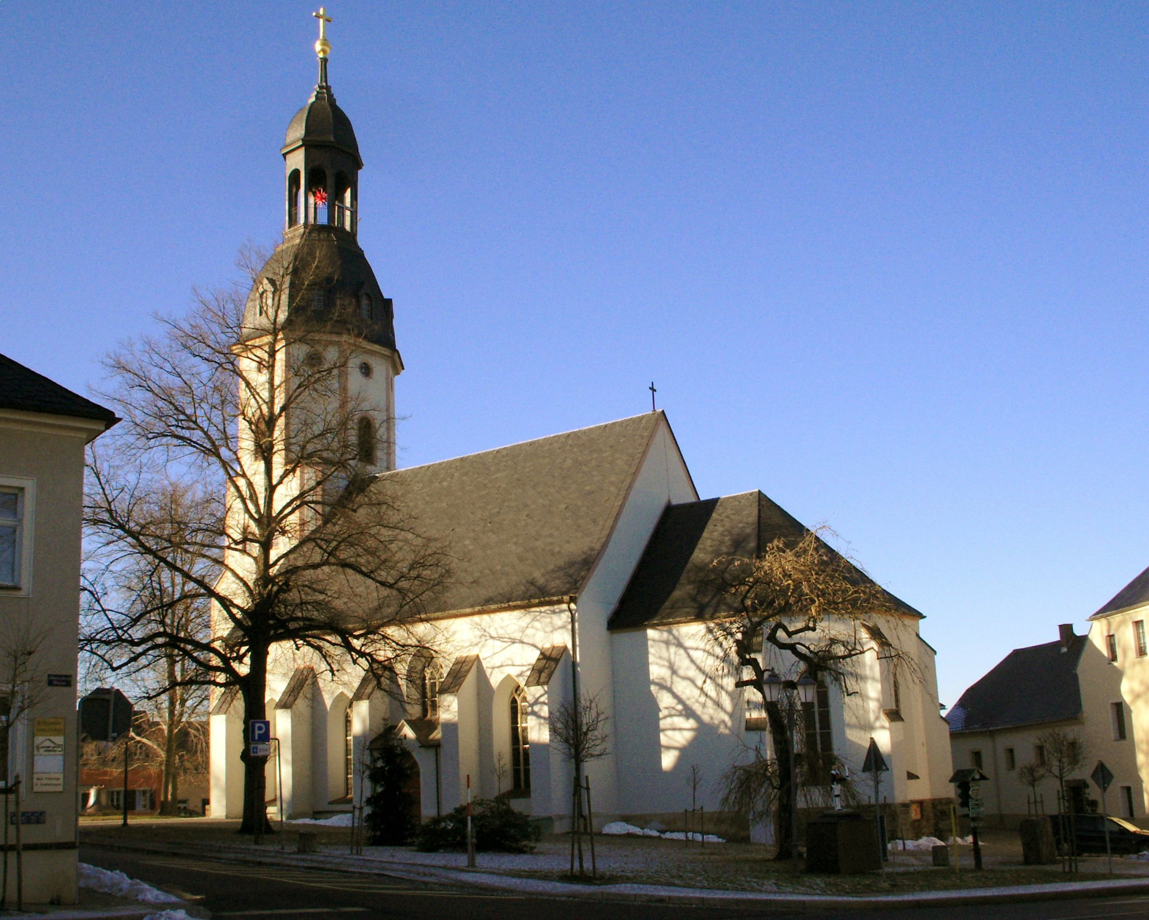 Kirche Schlettau